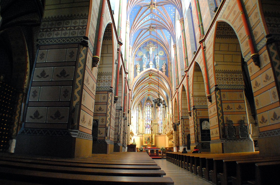 Katedra Wniebowzięcia NMP we Włocławku - Nawa Główna